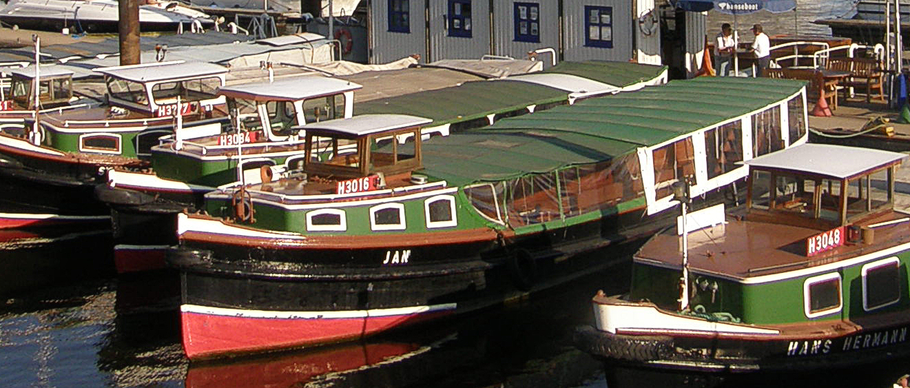 Die 1928 gebaute Barkasse Jan 2008 in Hamburger Hafen